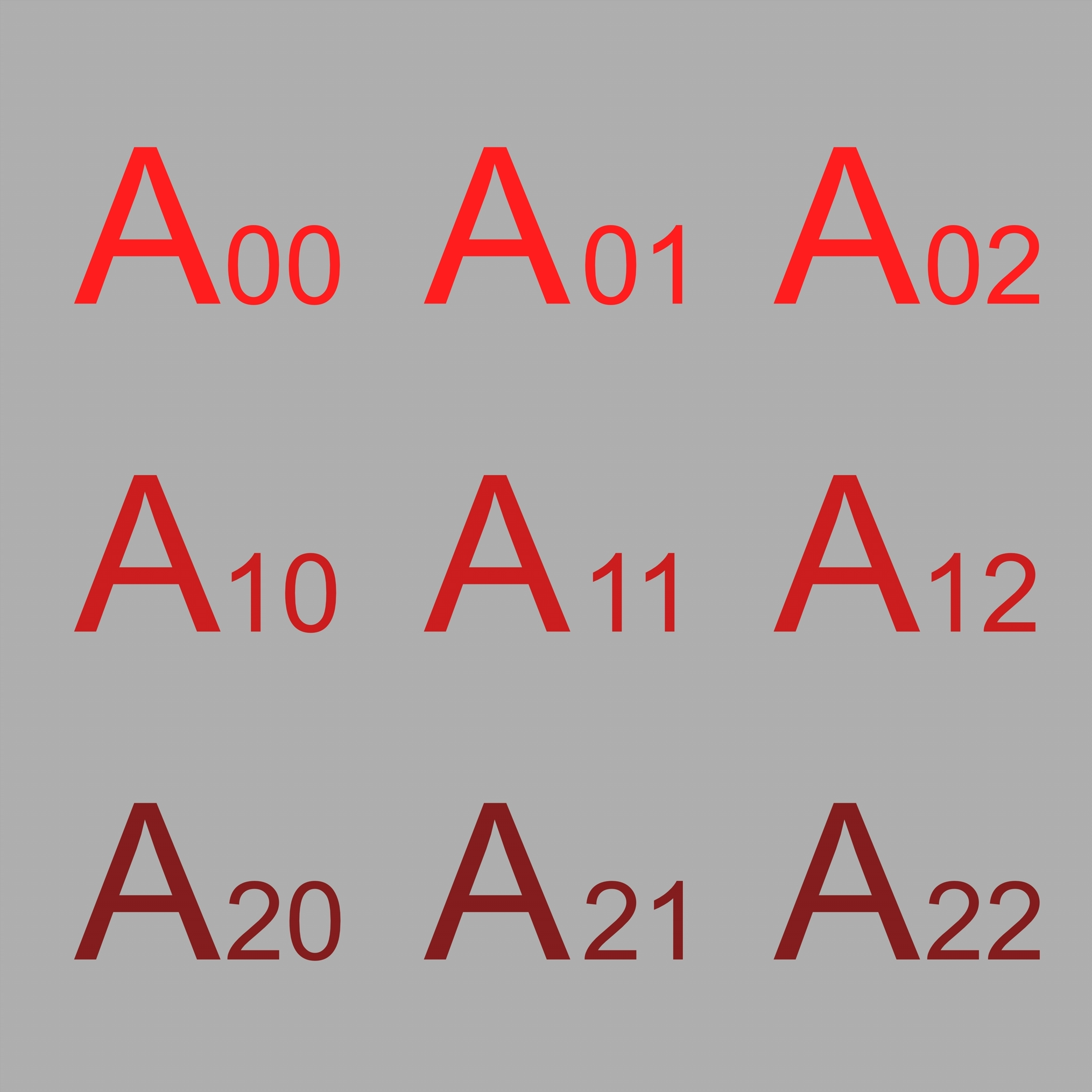 Die Abbildung zeigt die Matrix A. Diese ist rot eingefärbt, um diese im Video über den Ablauf des Algorithmus zu erkennen.